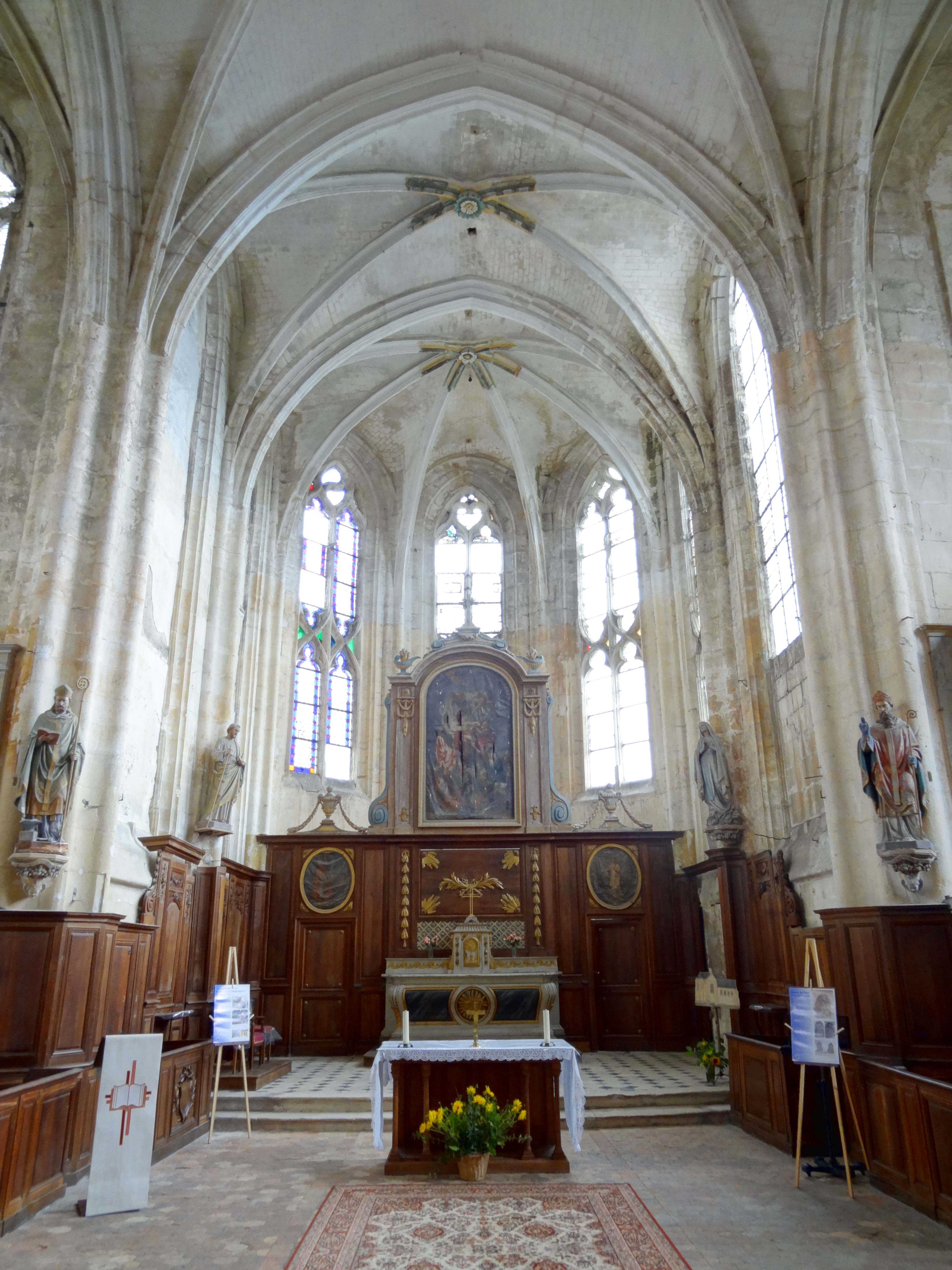 Intérieur de l'église - voir titre.